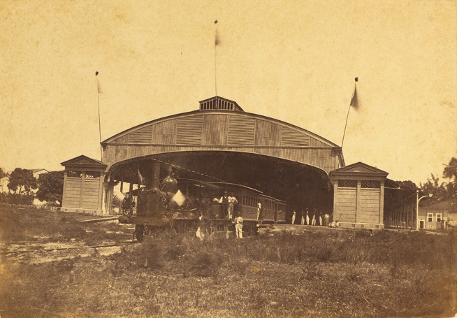 Trem que conduziu o Duque de Saxe (Luis Augusto Maria Eudes de Saxe-Coburgo e Gotha, 1845-1907) e o Conde D'Eu em comemoração ao dia 13 de agosto de 1868.